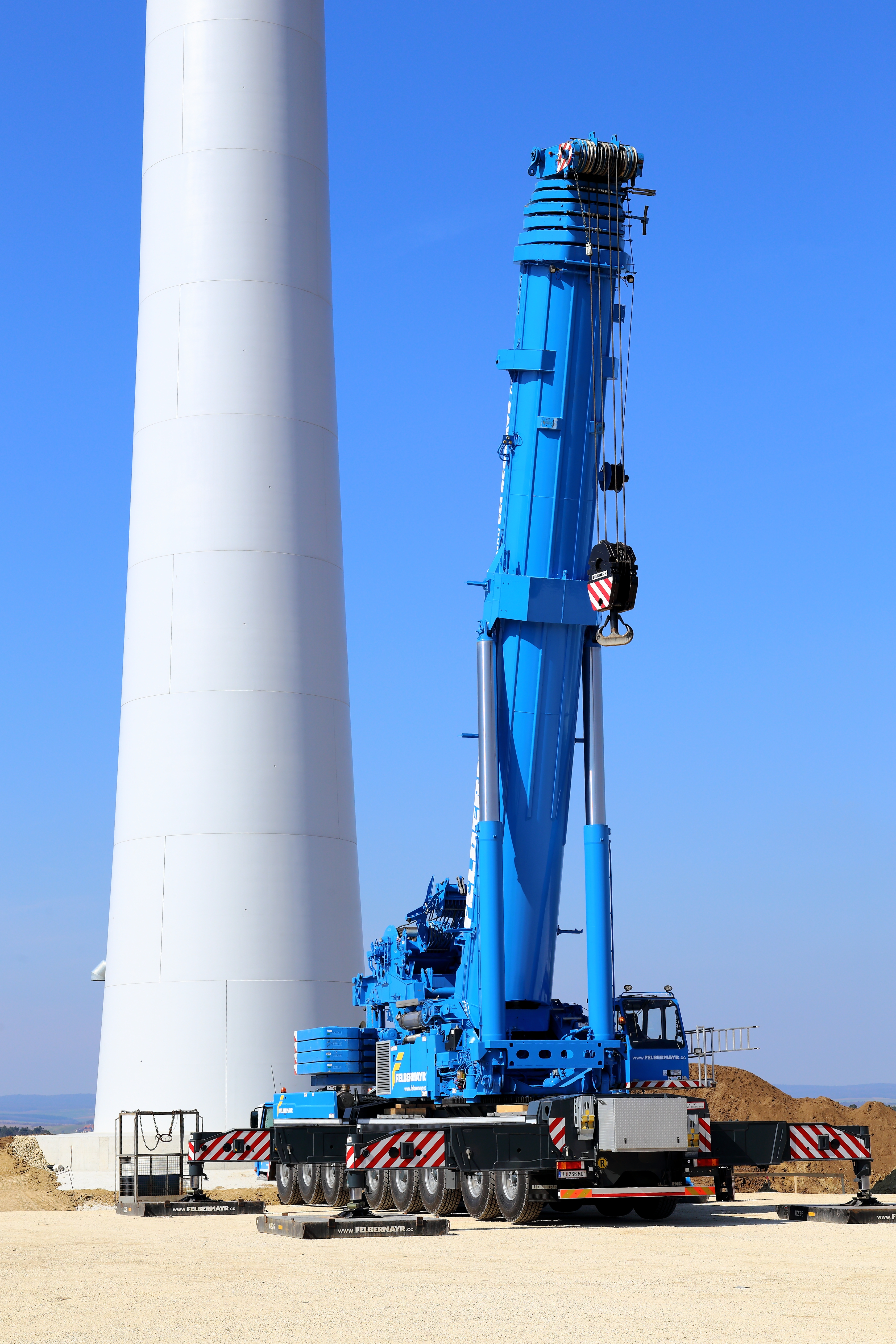 Ein Liebherr LTM 1500-8.1 Kran der Firma Felbermayr bei der Montage von Windkrafträdern im Weinviertel, Niederösterreich. Die max. Traglast des achtachsiegen All-Terrain-Kranes mit der Werksnummer 095296 (Bj. 2015) beträgt 500 Tonnen. Der Fahrmotor hat eine Leistung von 500 kW und der Kranmotor von 240 kW. Weitere Daten: 84m langer, 7-teiliger Teleskopausleger und Gitterspitze bis zu 91m Länge; 96 t Einsatzgewicht.